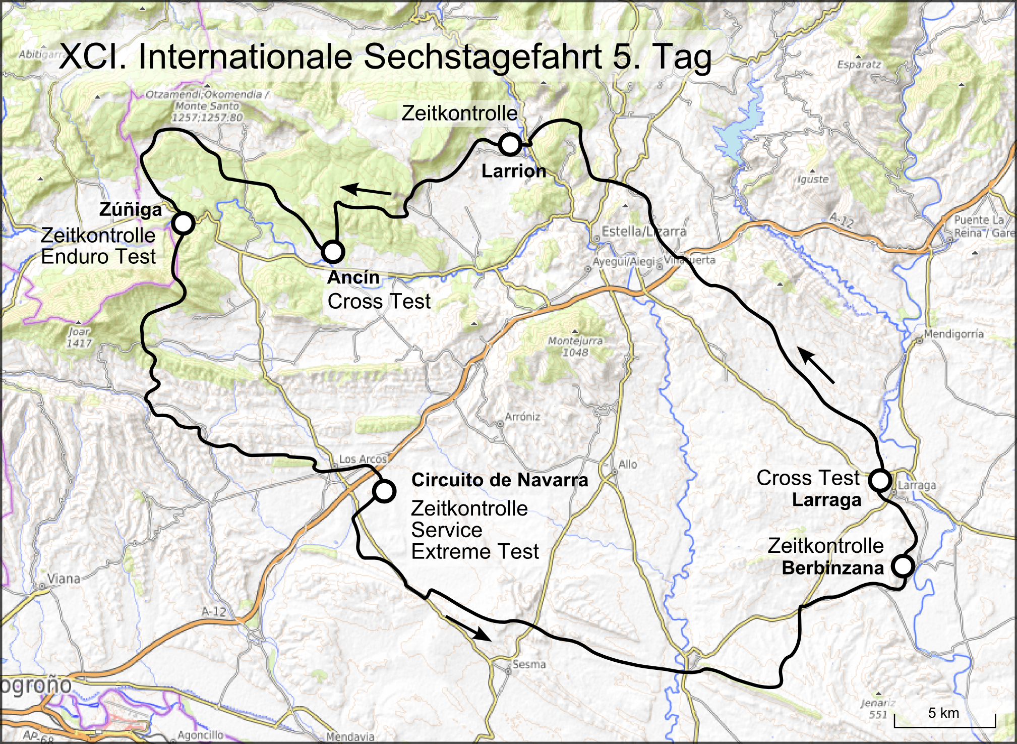 Karte der 91. Internationale Sechstagefahrt, Route der Tage 5